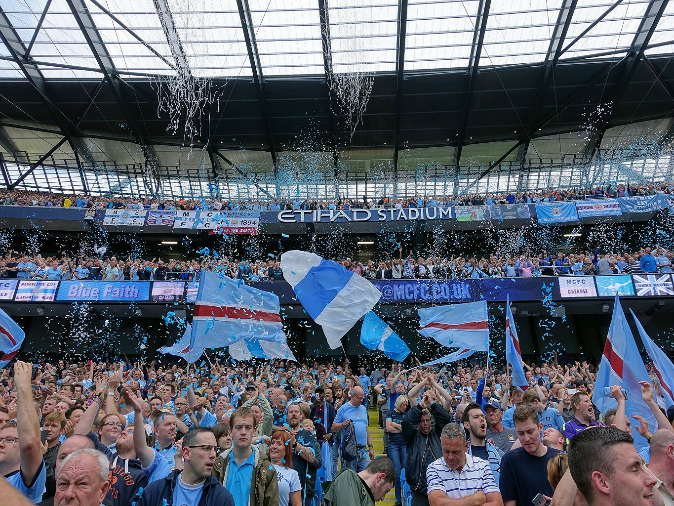 Credits: @JRB - bluemoon